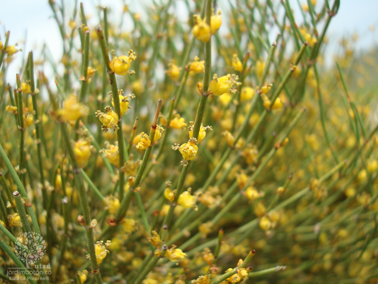 por Eulàlia Picornell Segura do Jardim Botânico UTAD, Flora Digital de Portugal.